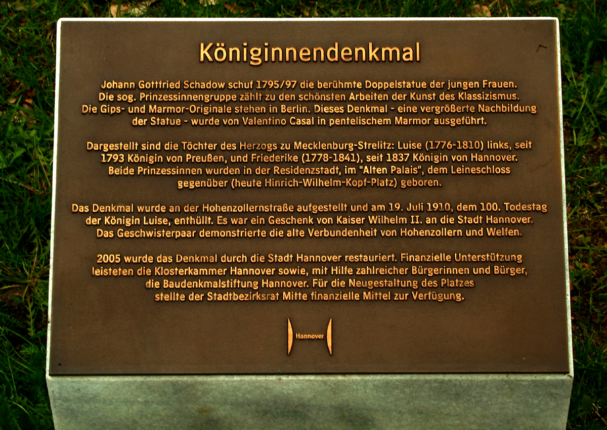 Sie haben ein besseres Bild? Sogar ein historisches Dokument als Bild(ungsförderung)? Zeigen Sie' s uns. Stiften Sie es, allen Menschen.